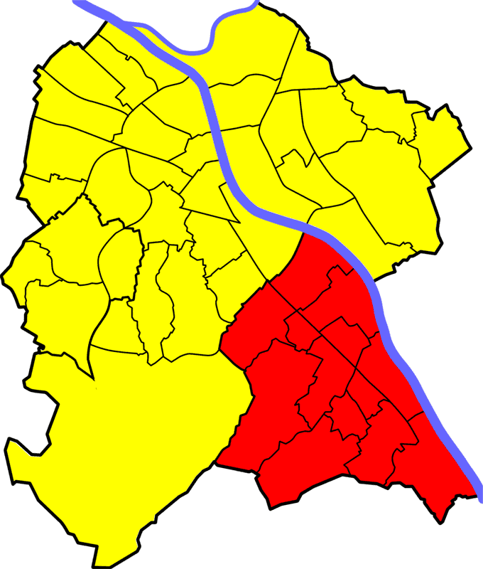 Bad Godesberg in Bonn